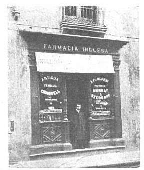 Fotografía de la Farmacia Inglesa, propiedad de Edmundo E. Cranwell. Establecimiento ubicado sobre La Calle de la Victoria al 647 (Buenos Aires)